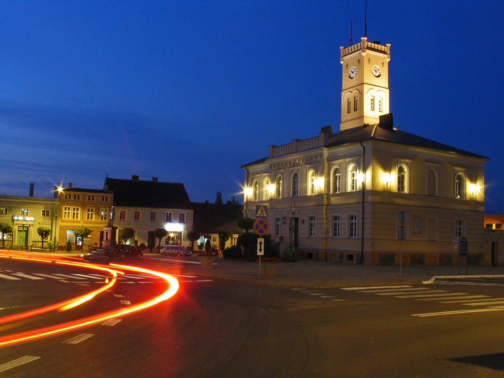 Rynek, ratusz miejski (Urząd Miasta i Gminy) oraz pomnik św. Floriana w Krobi.